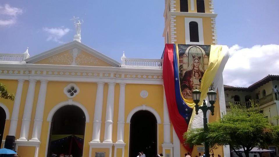 la foto se describe por si sola... y así es